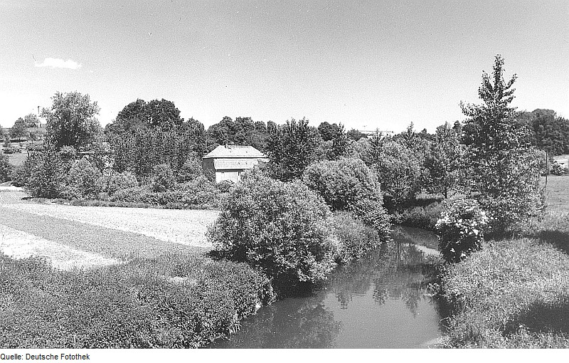 Original image description from the Deutsche Fotothek Löbau-Glossen. Ehem. Mühle und Löbauer Wasser